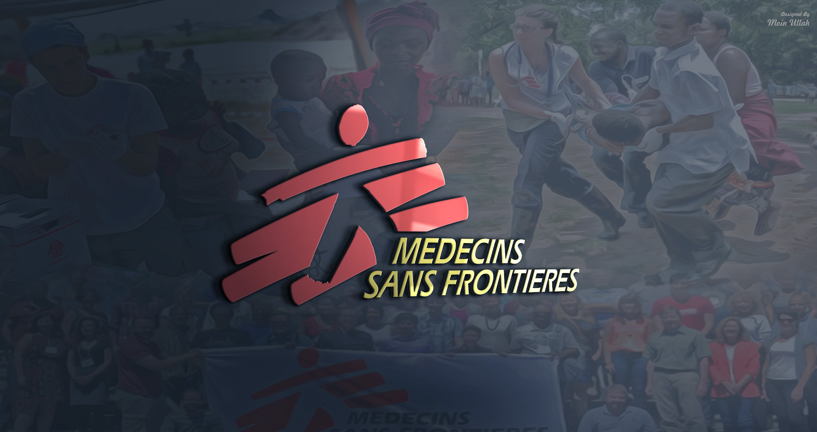 ایم ایس ایف کی لوگو پریزینٹیشن